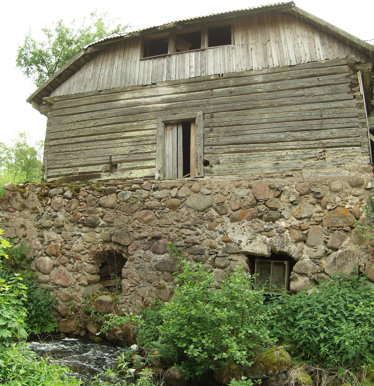 Čiulėnų vandens malūnas